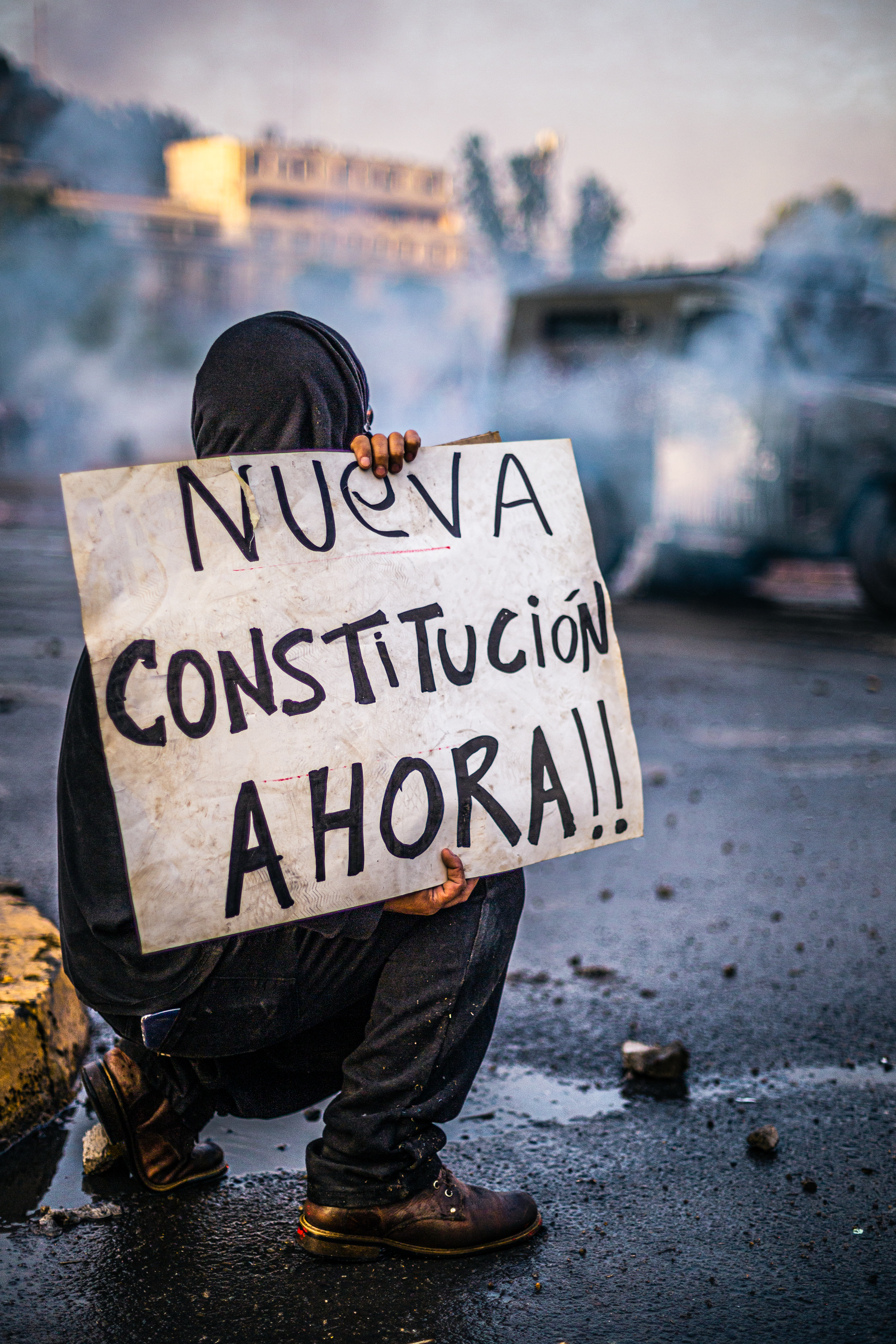 De cara frente a un carro lanza gases, un manifestante posa con su cartel exigiendo una nueva Carta Magna para Chile.